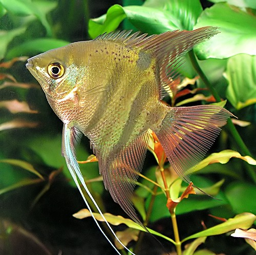 Skalar Żaglowiec Leopolda